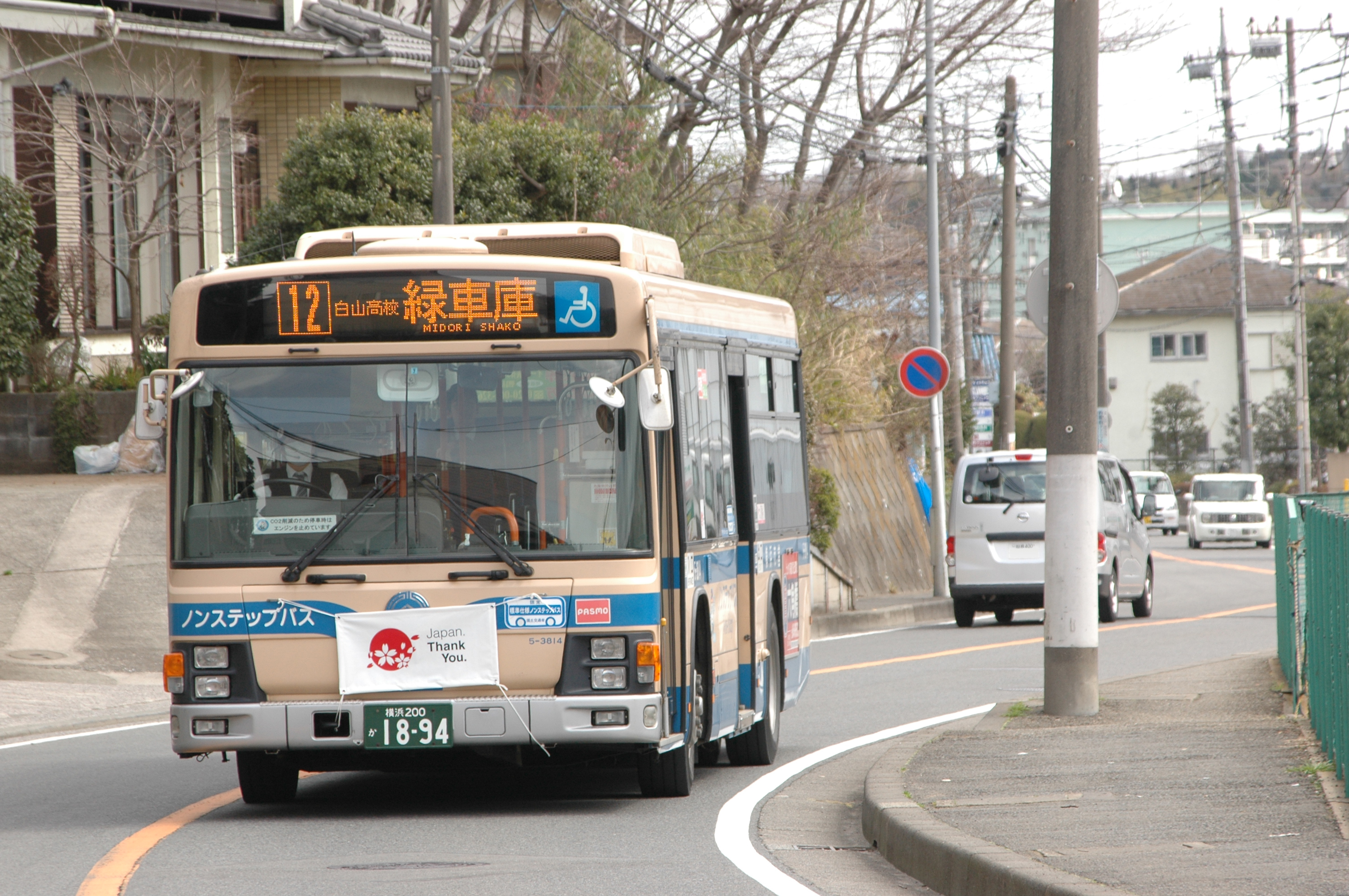 横浜市営バス12系統、菅田町付近にて。2012年3月12日撮影